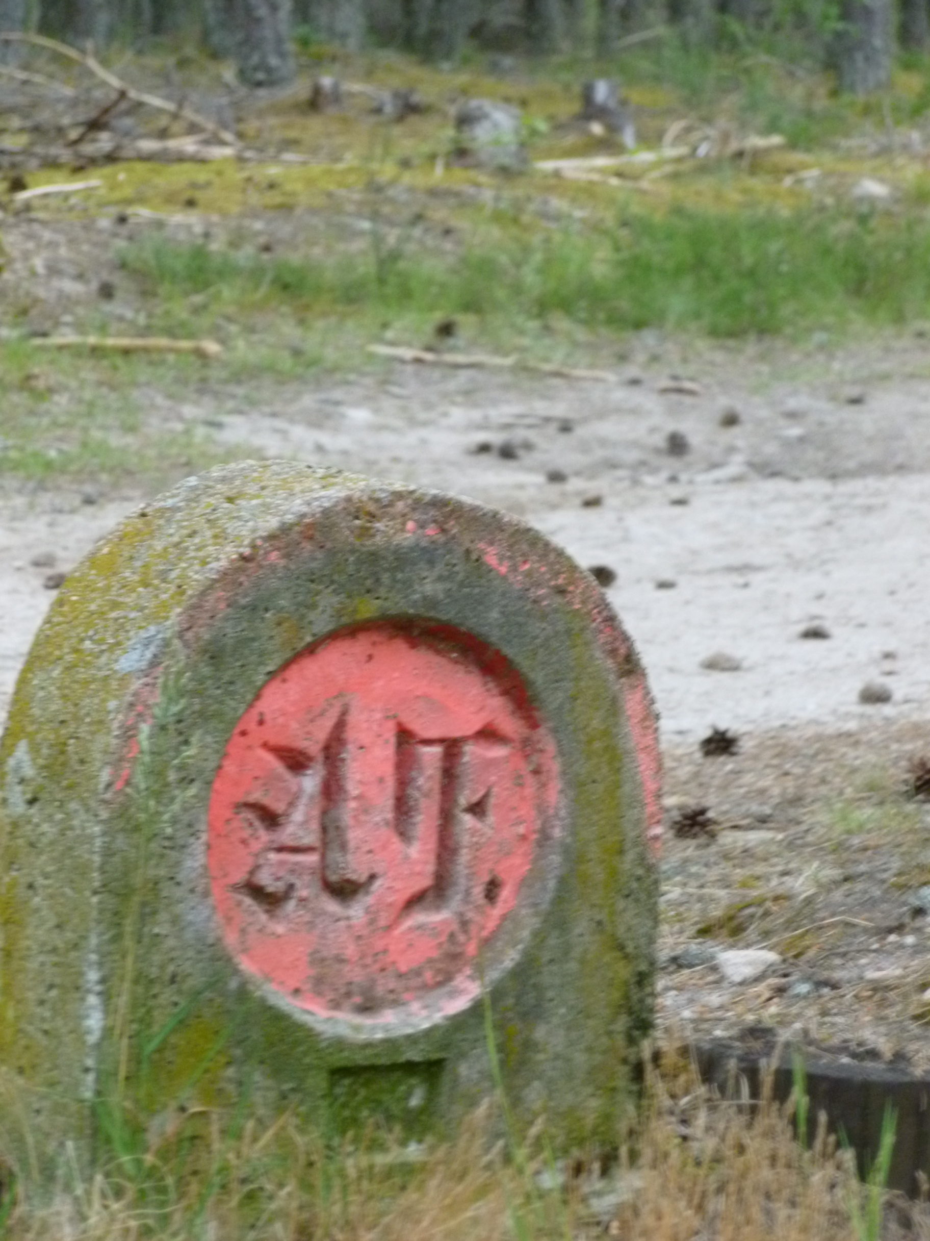 forêt de Ganigal Lozère